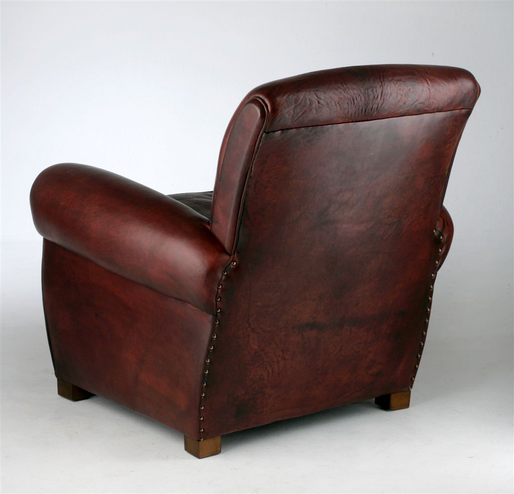 Foto eines handgefärbten Ledersessels